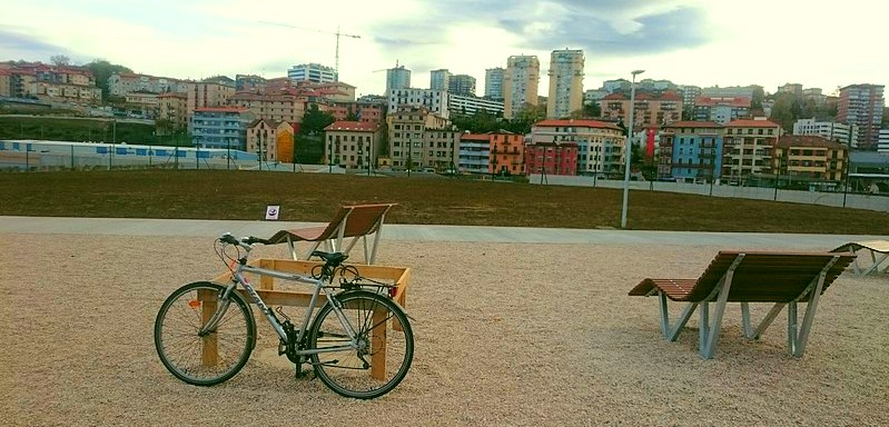 Altza Trintxerpetik